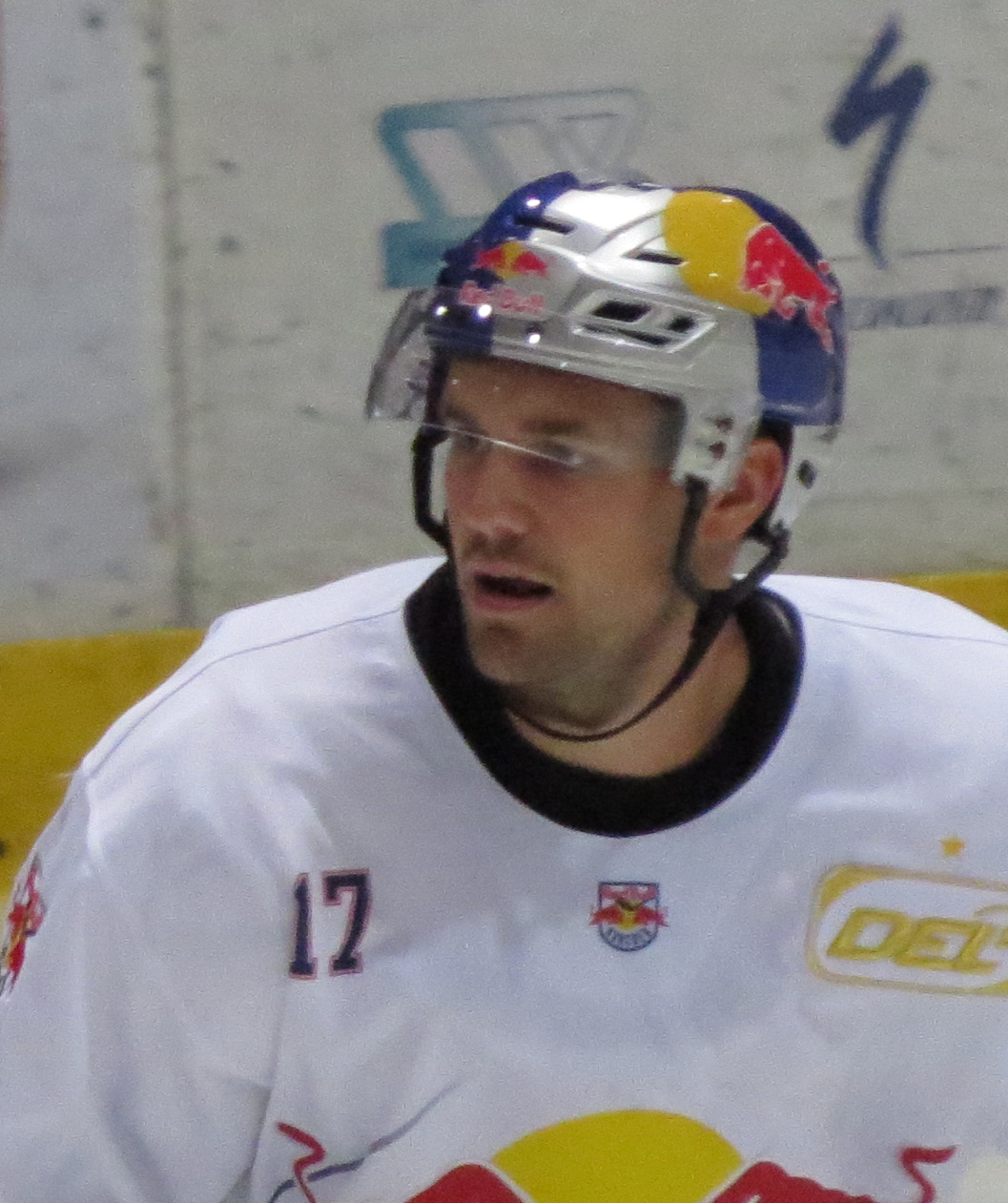 GSHC - Redbull Munich 17 : Brooks Macek